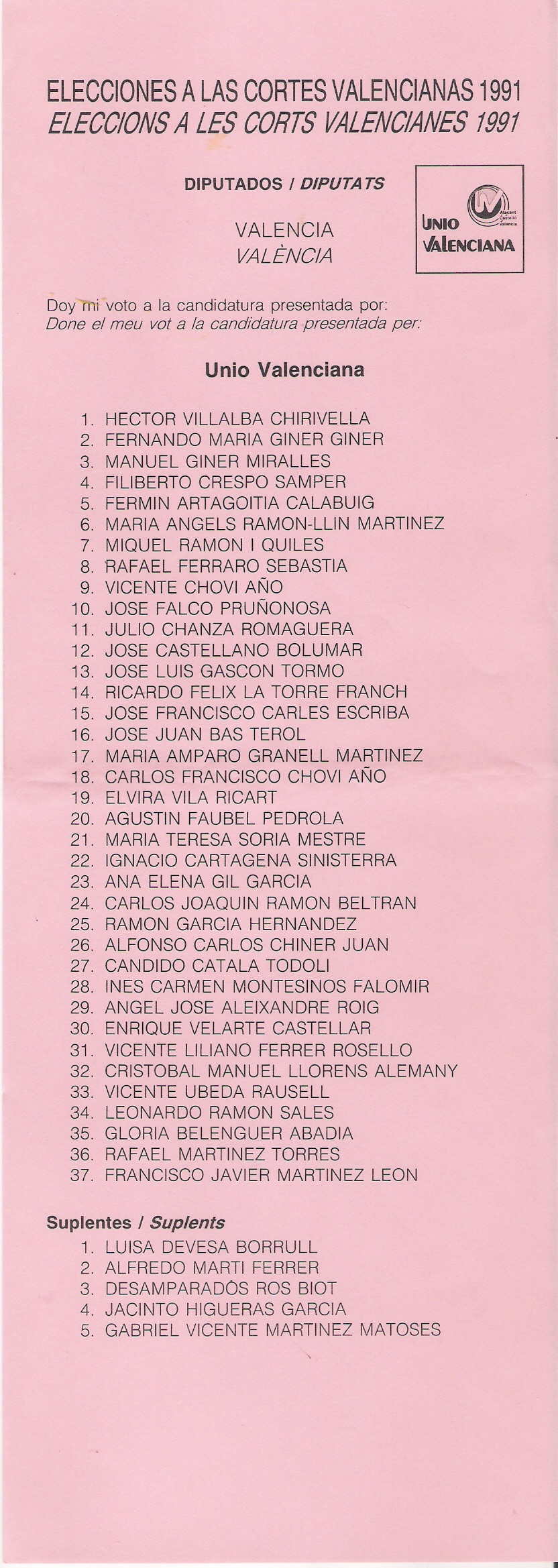 Papeleta electoral de Unión Valenciana por la provincia de Valencia para las Cortes Valencianas, en 1991.